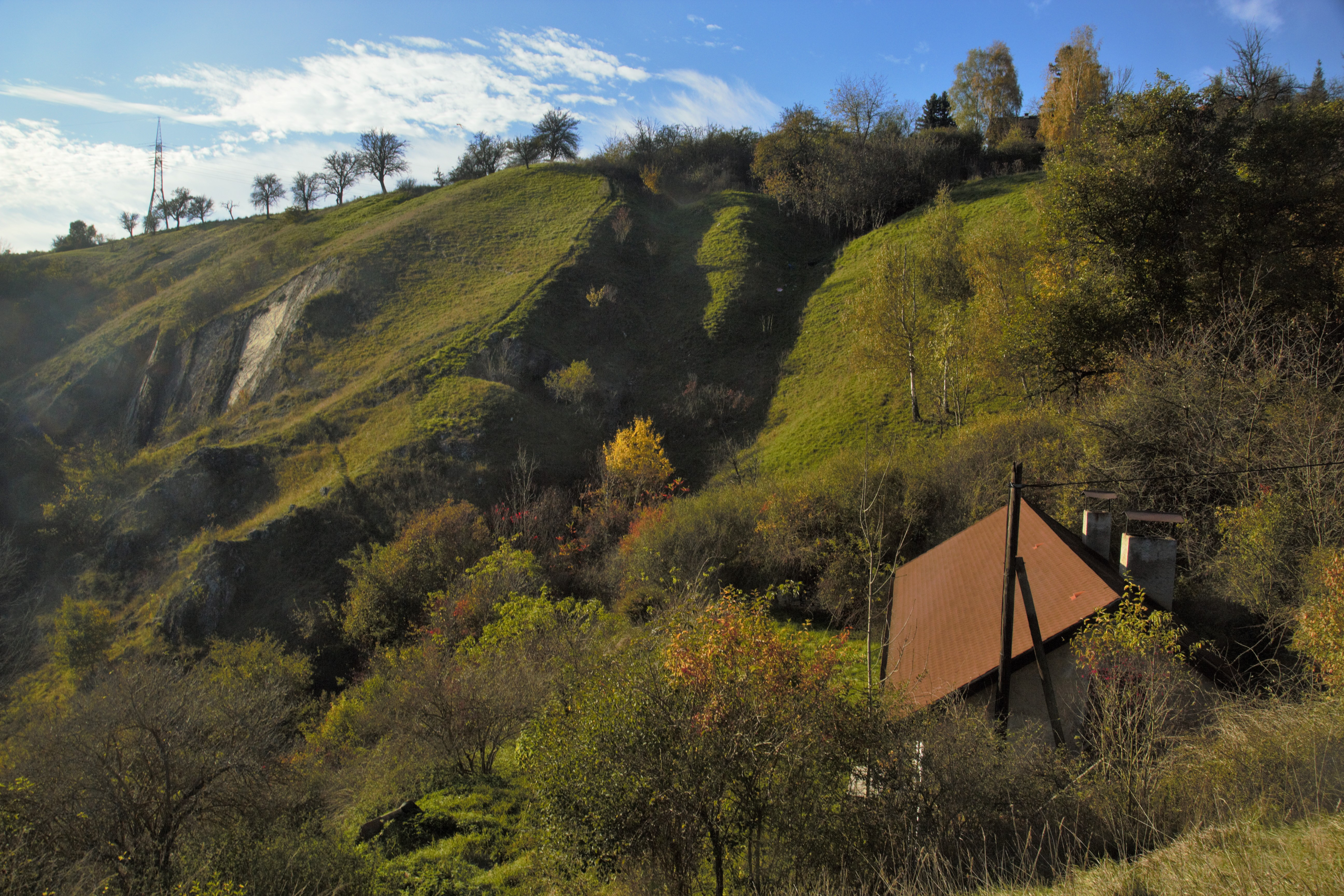 Pohled na teplomilné stráně s domkem ČSOP Tereza 2014